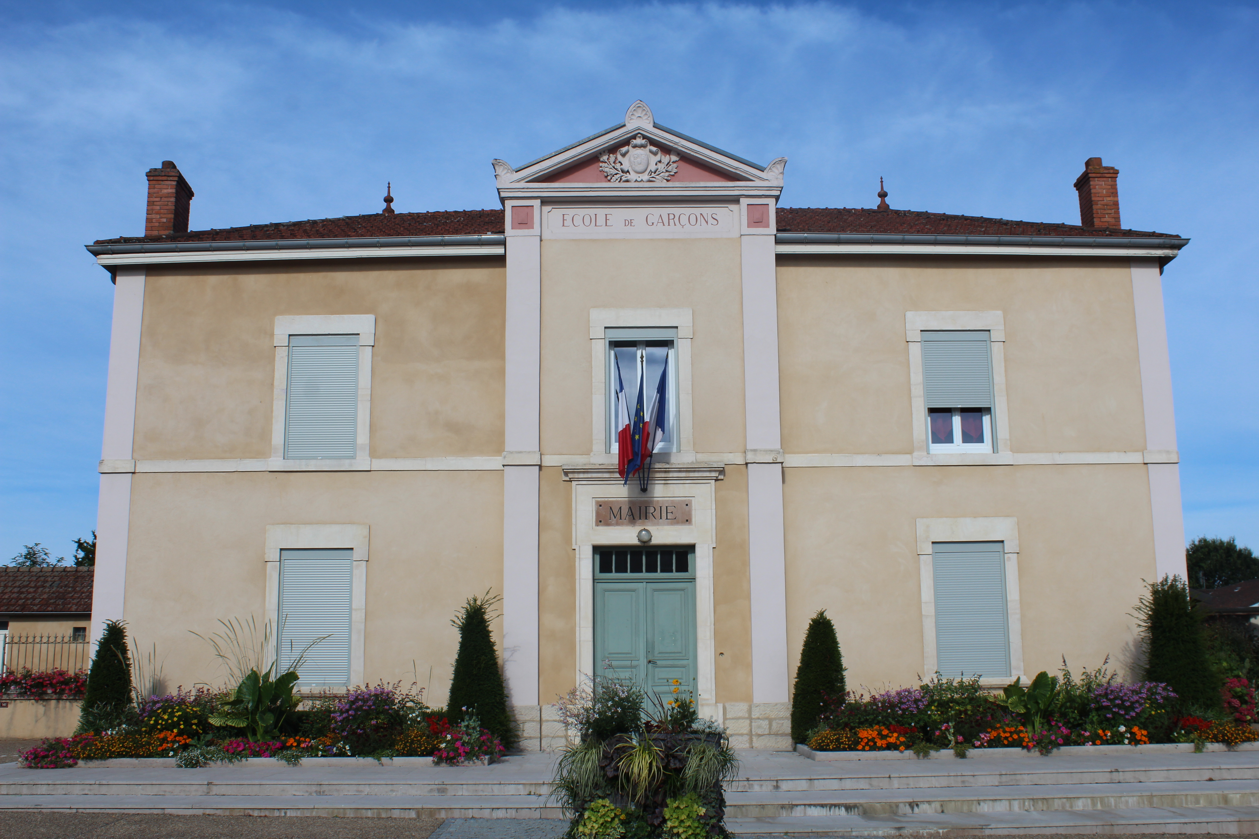 Mairie de la commune de Crottet.